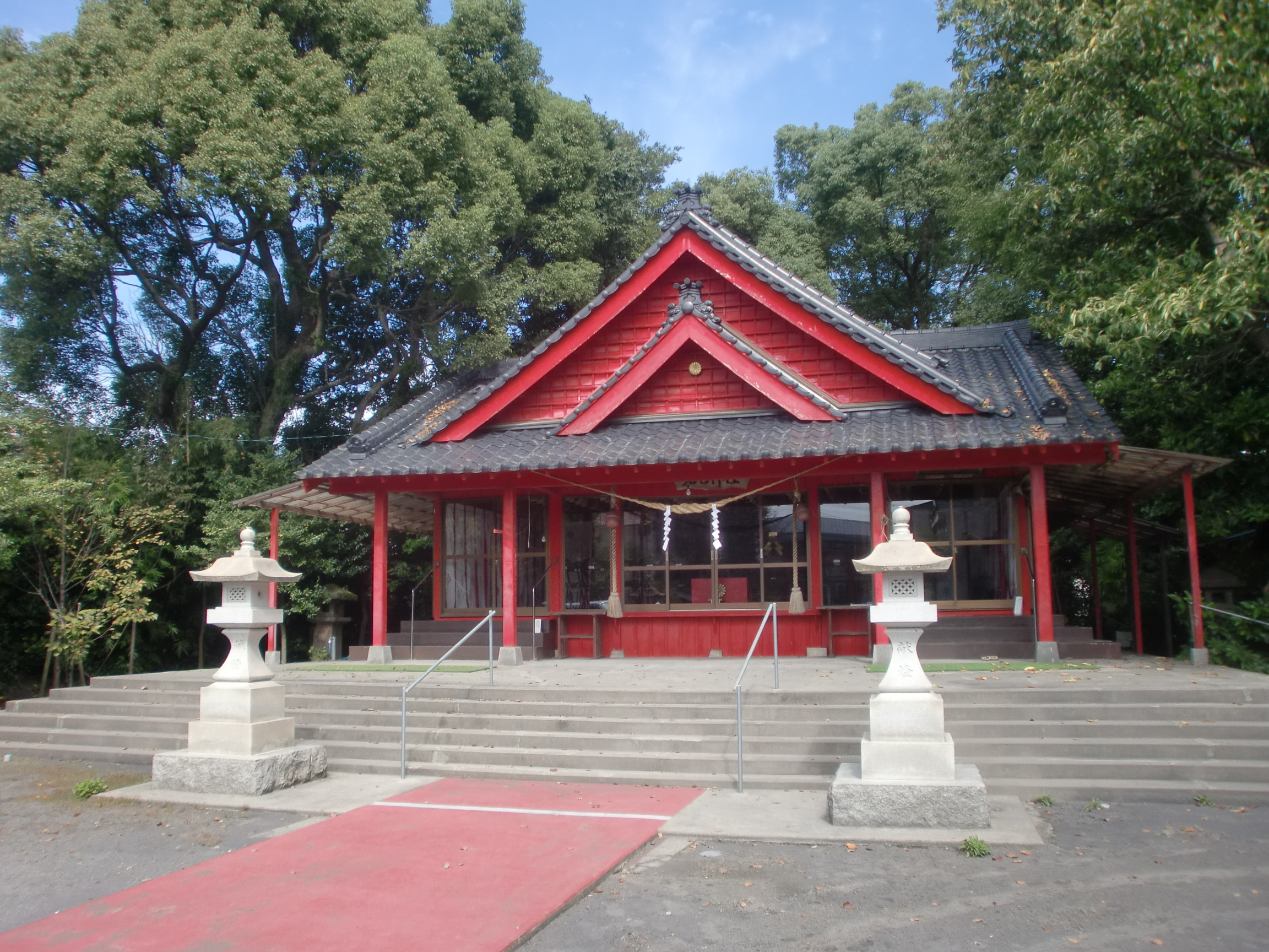 若宮神社 (鹿児島市)の本殿の外観。